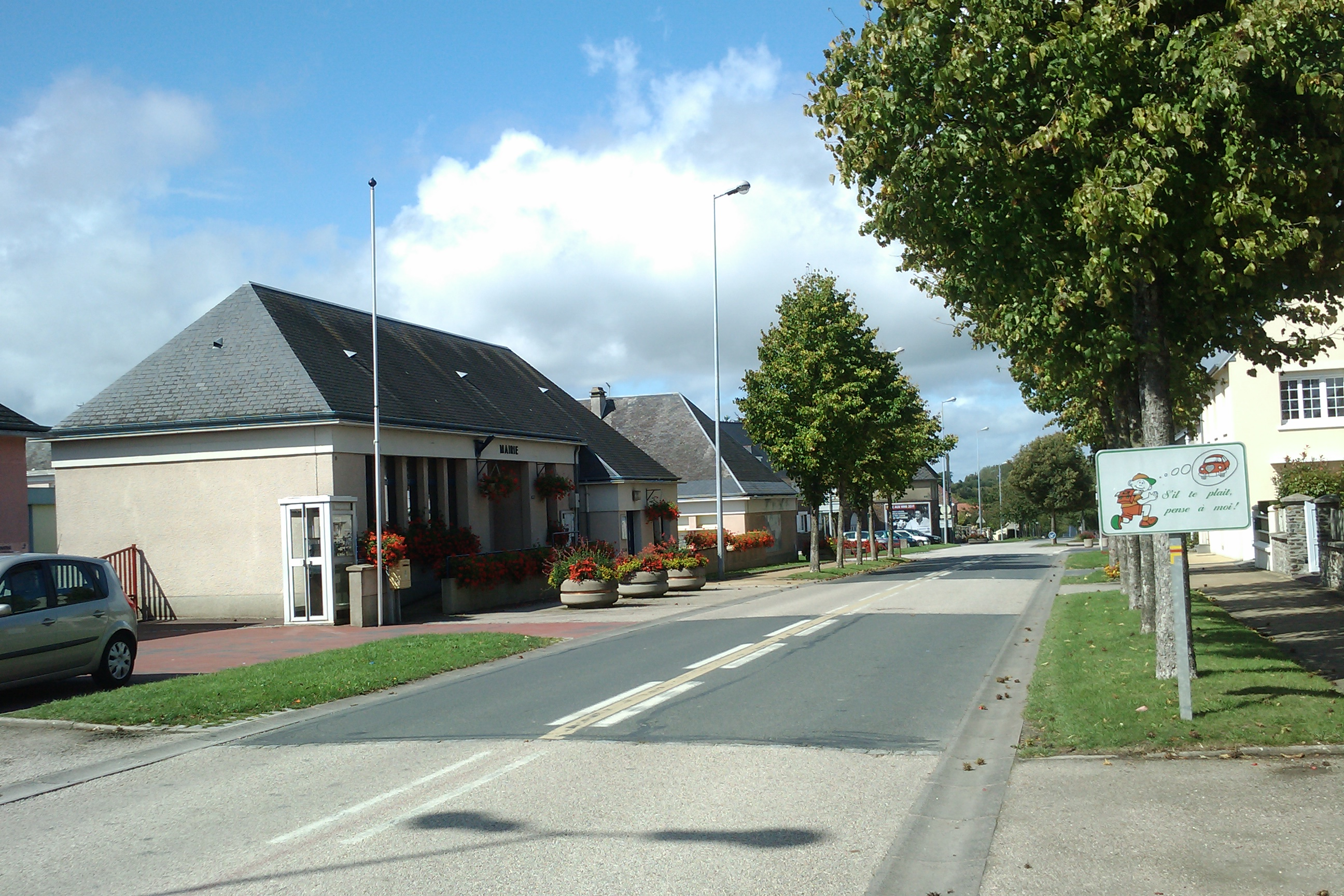 Hébécrevon